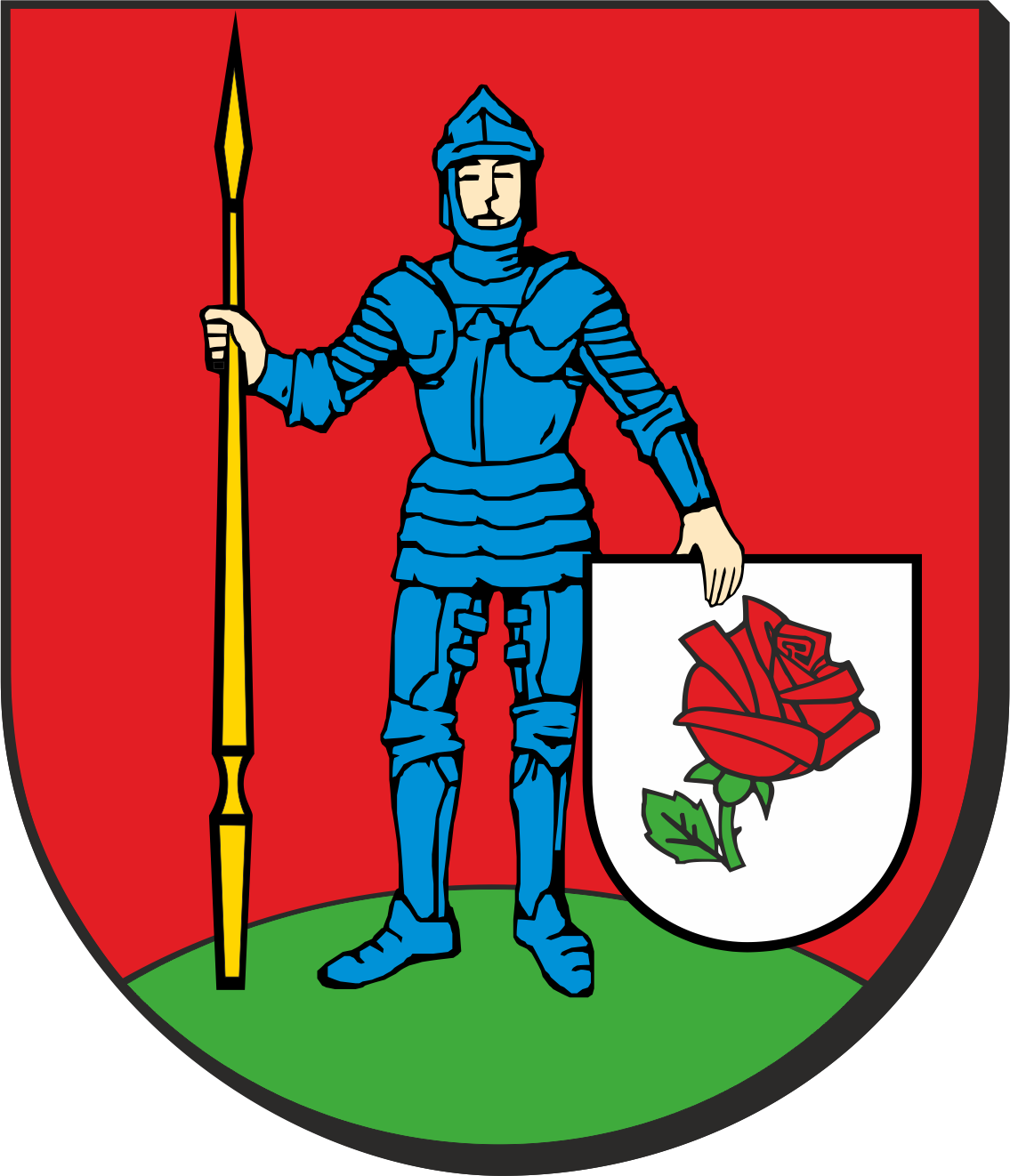 Herb Powiatu Ostródzkiego